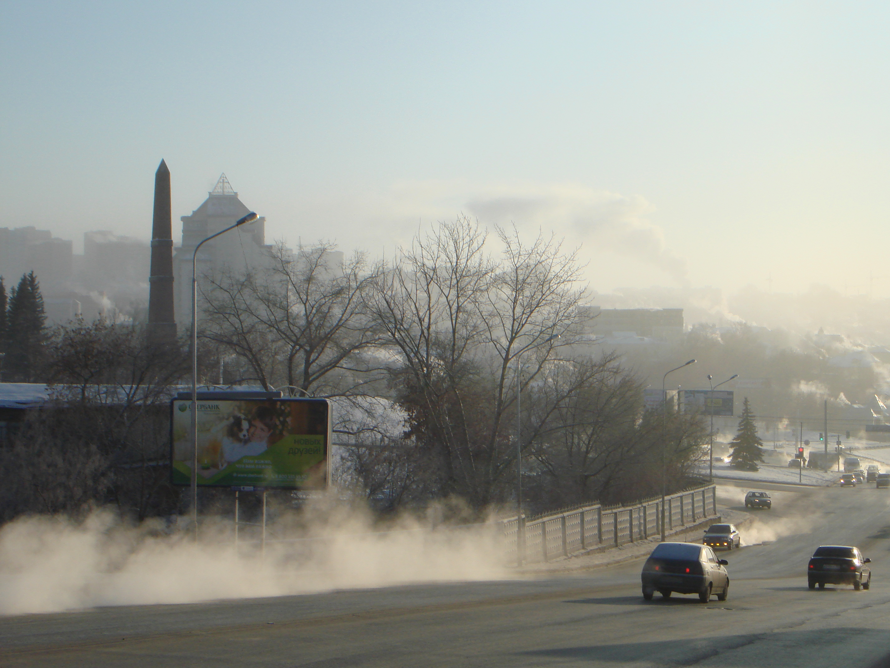 Frozen Ufa at minus 40C